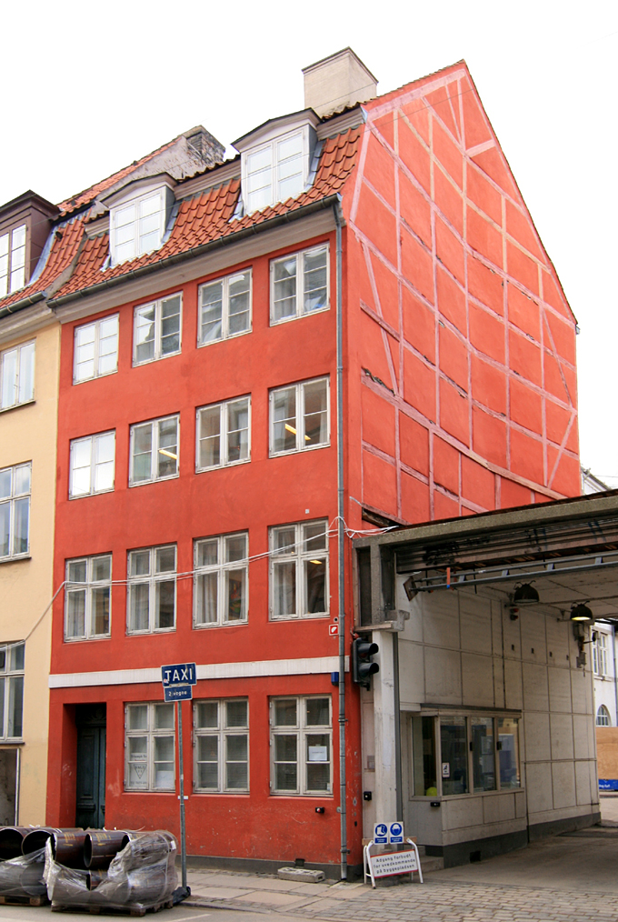 Antonigade 3, København. Bygget 1903. Fredet.